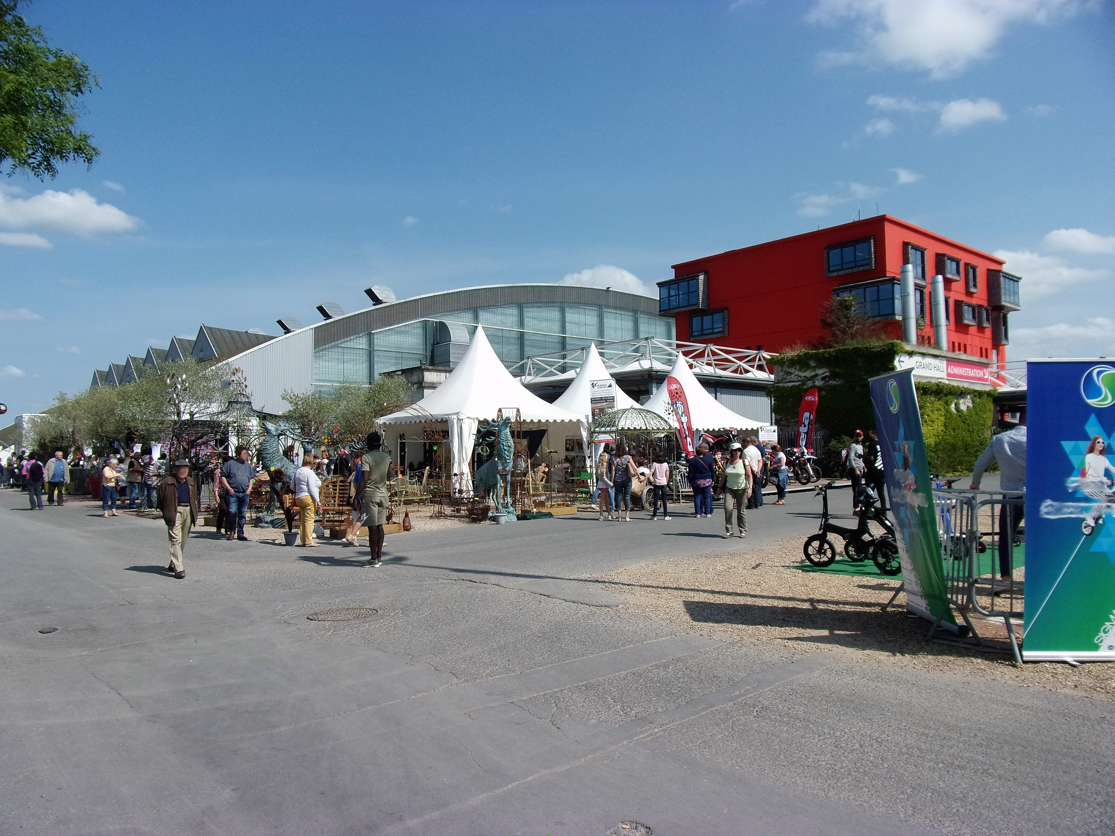 La parc des expositions (grand Hall) pendant la foire de Tours 2018.